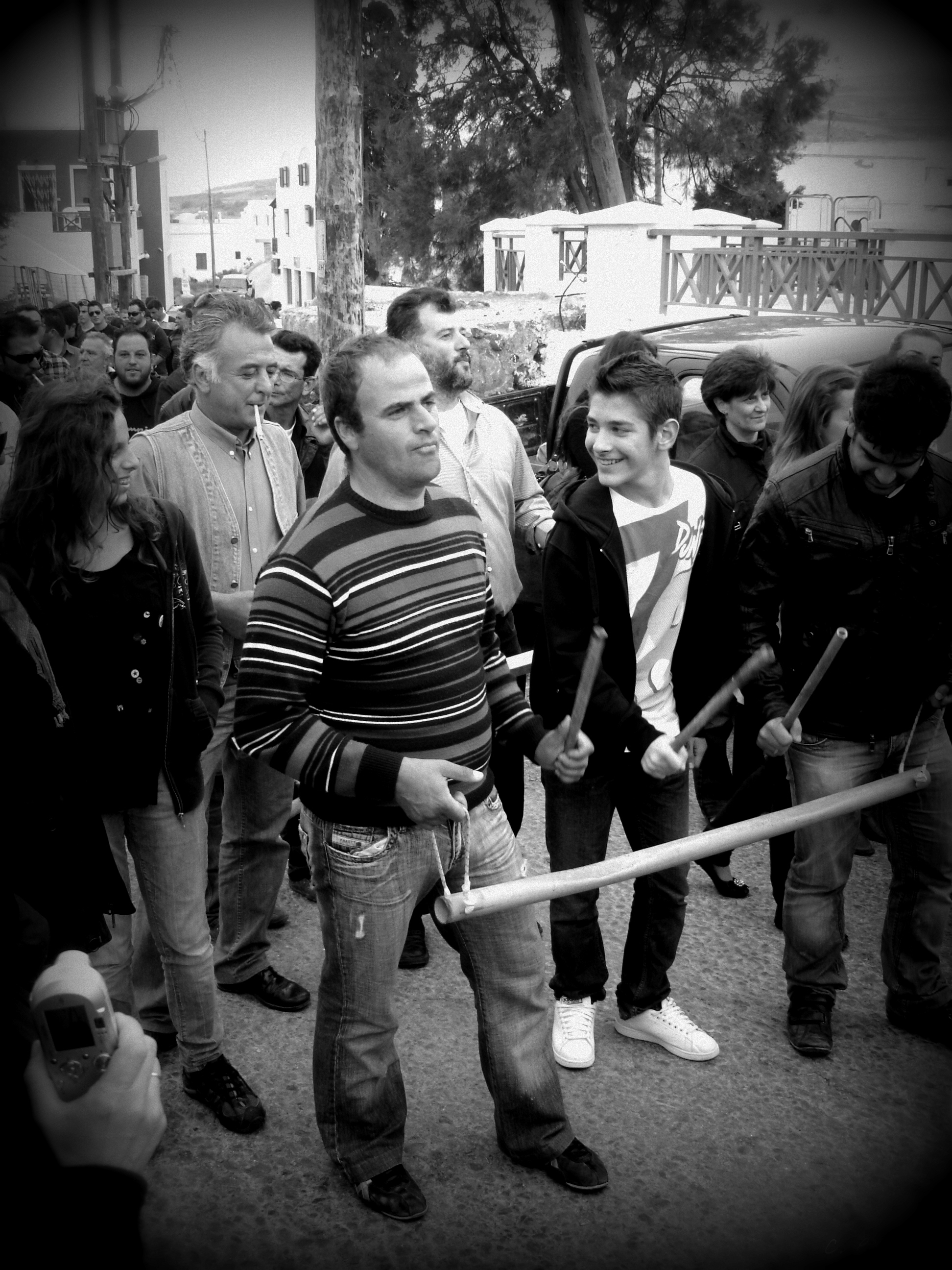 Σήμαντρα